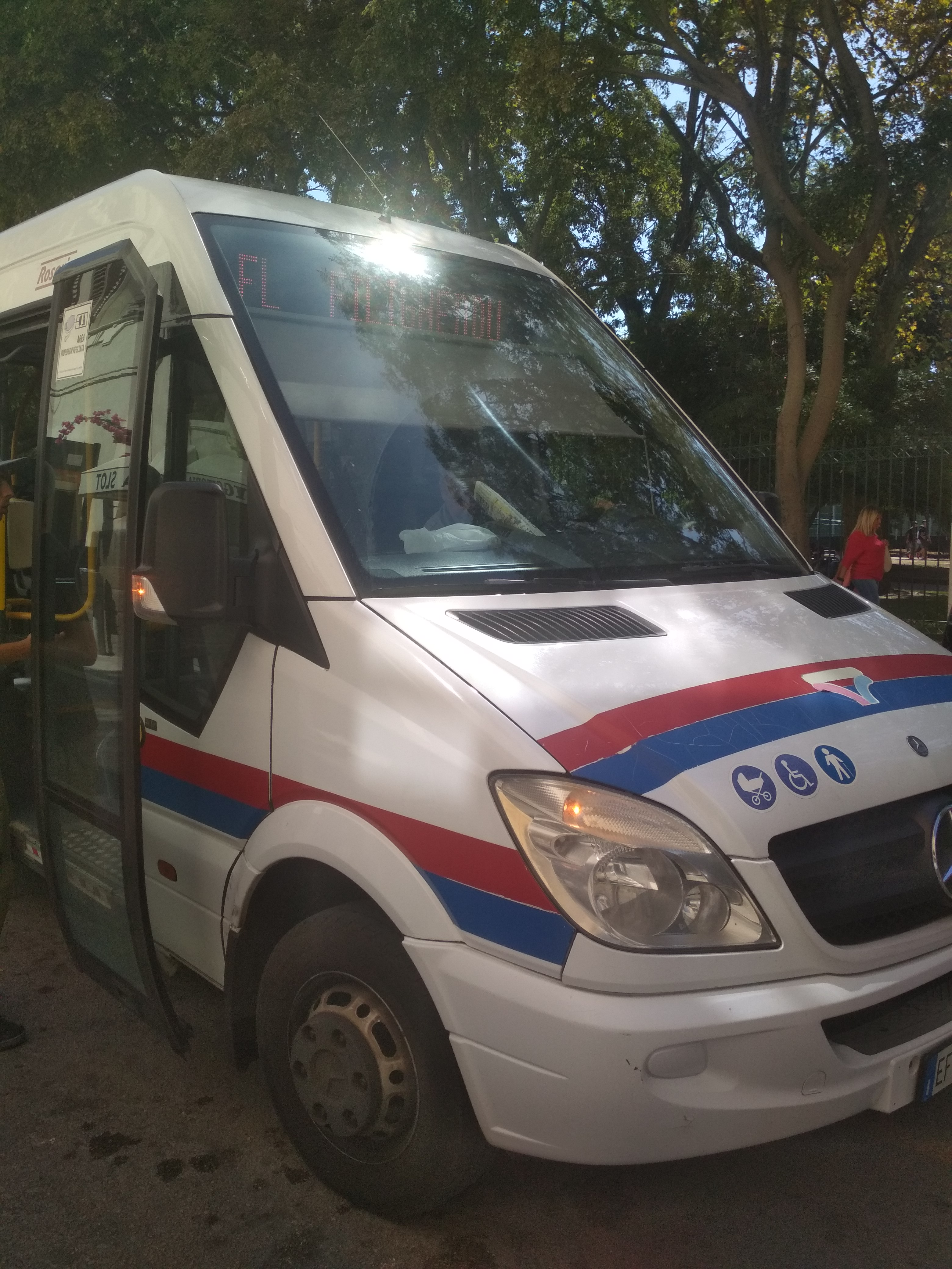 La nuova linea FL Filigheddu al capolinea di C.so Regina Margherita